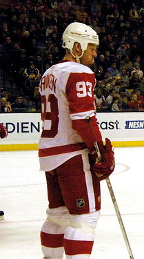 #93 Johan Franzen (LW)